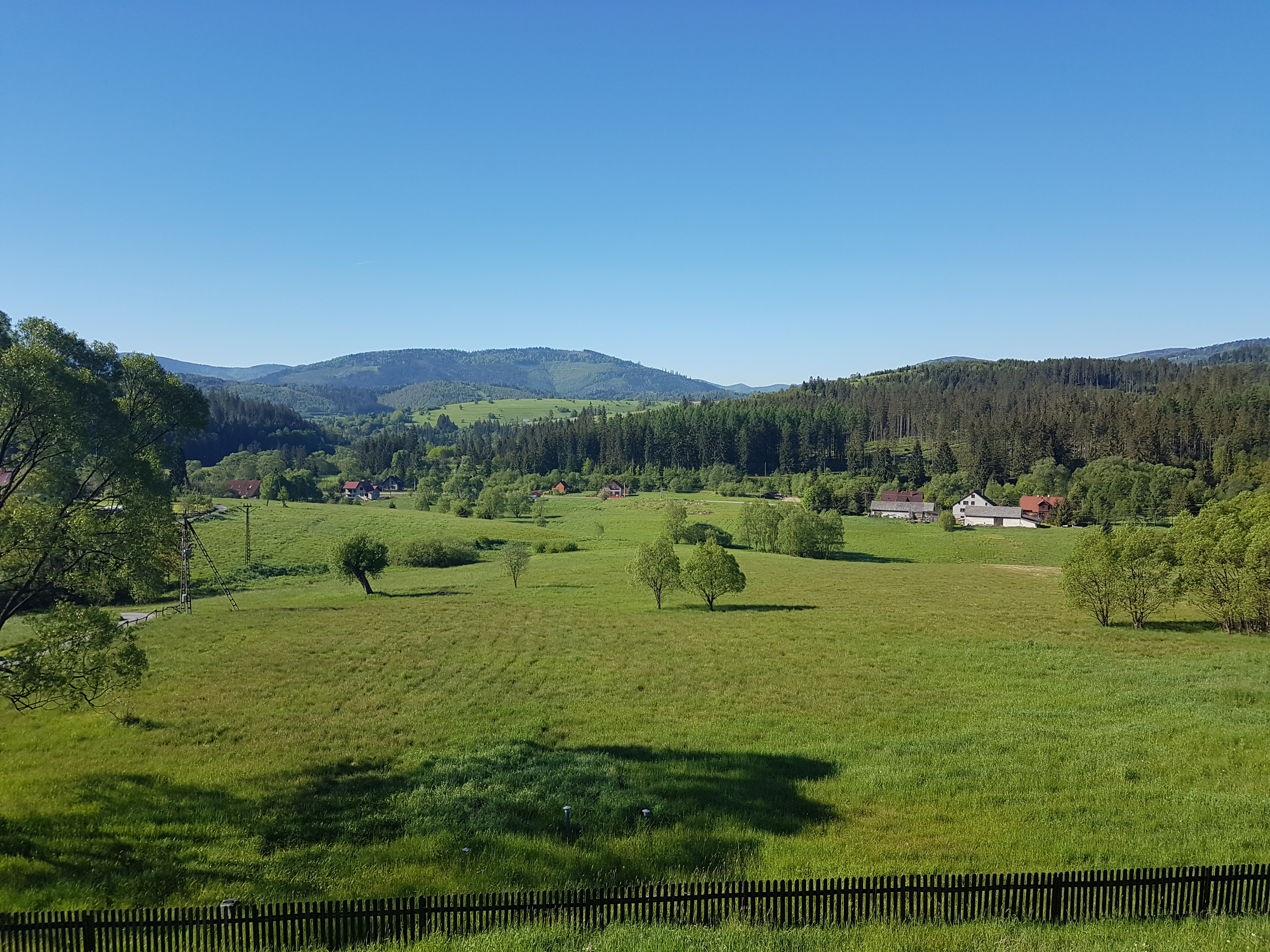 Widok z góry Kiczora